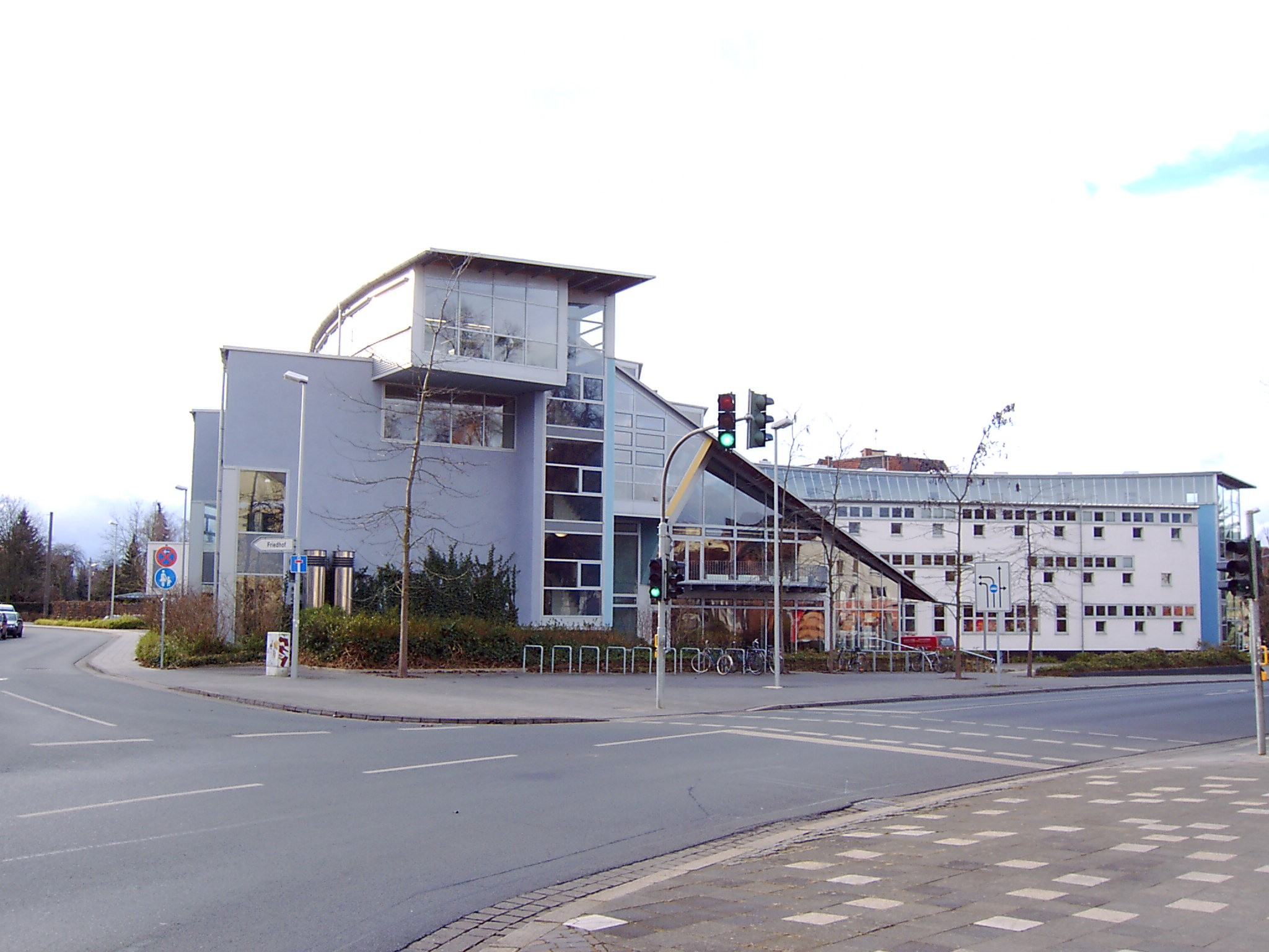 Gebäude der Fachhochschule am Zimmerplatz bzw. am Goschentor in Hildesheim